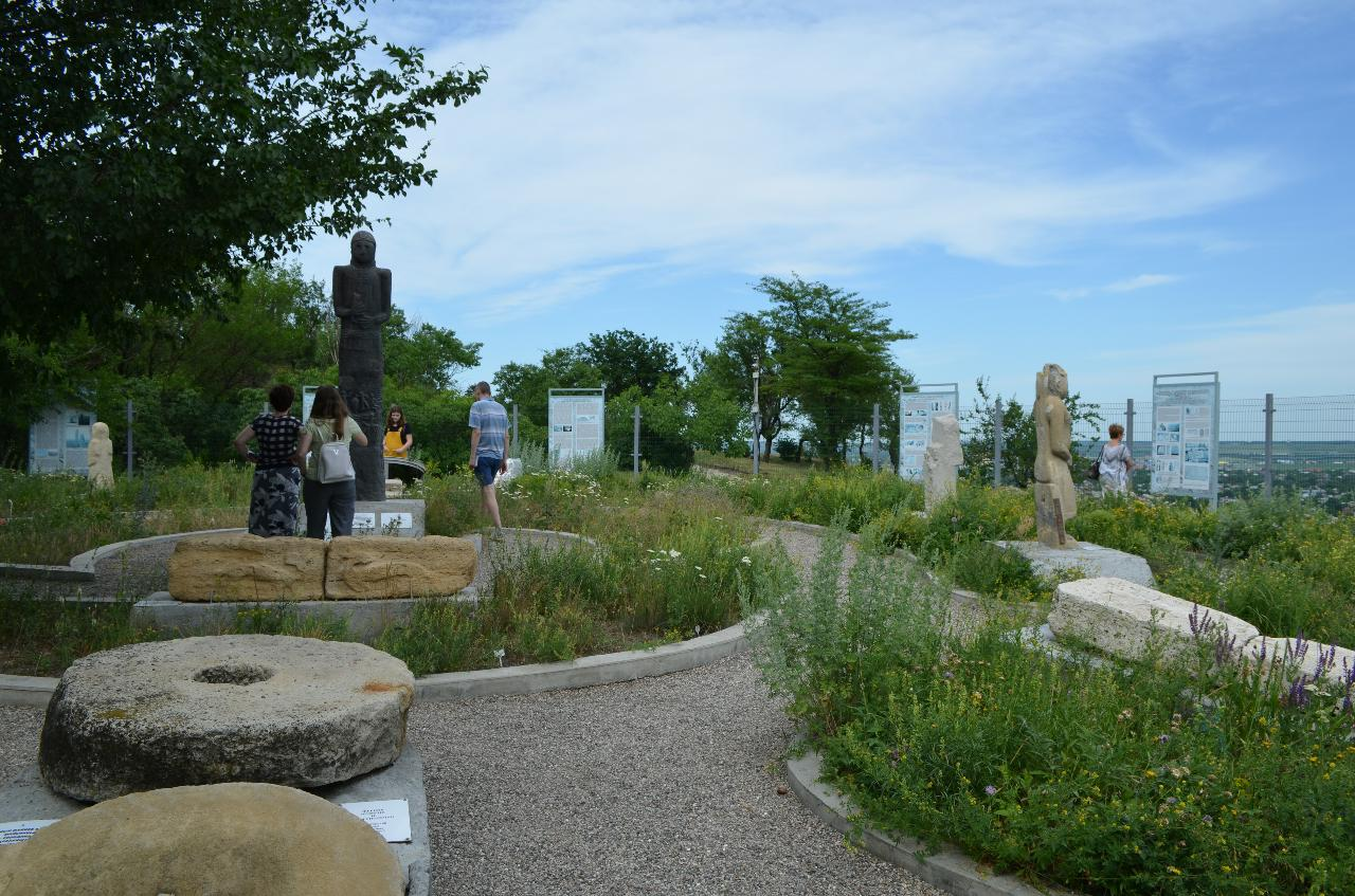 Музей каменных древностей на горе Горячей в Пятигорске